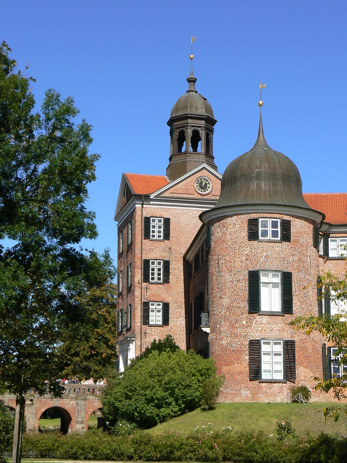 Eutiner Schloss. Blick von Süden auf den Eckturm und die Brücke über den Schlossgraben.